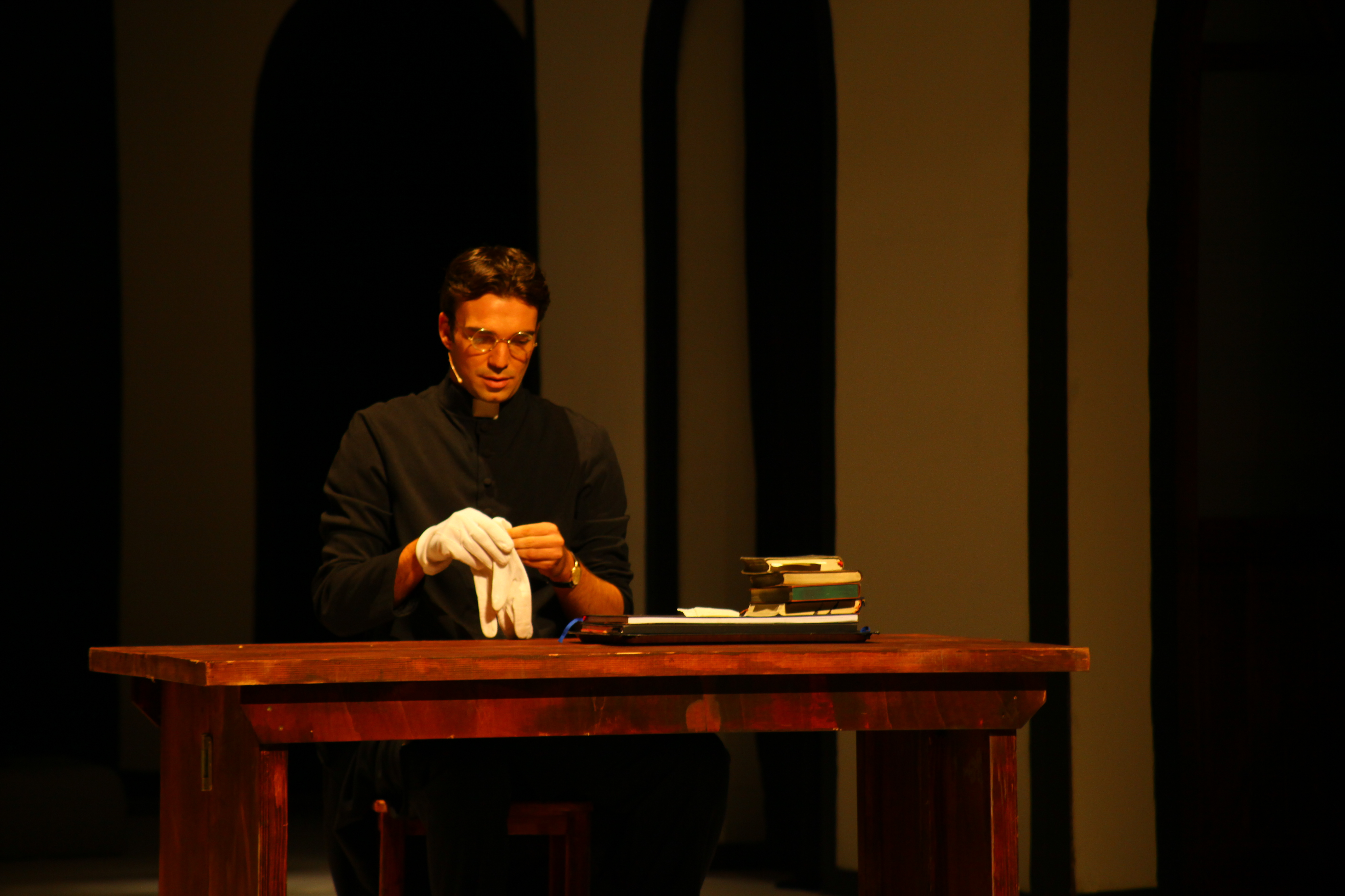 Premijera predstave "Glorija"